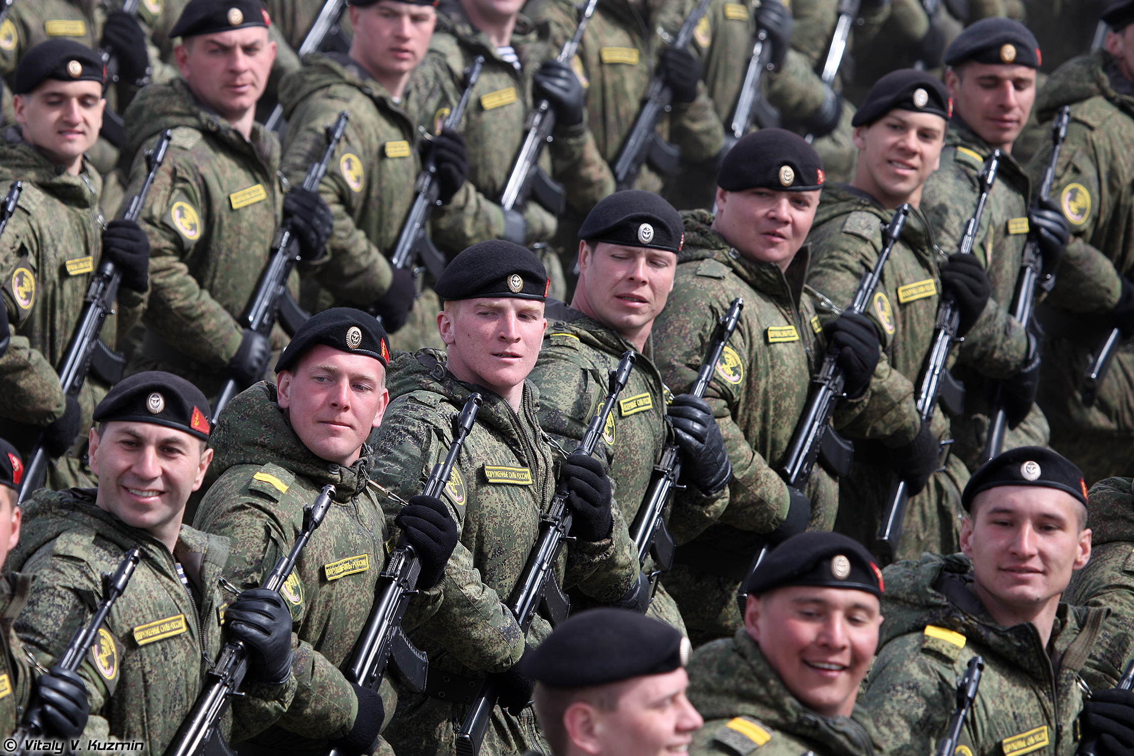 61-я отдельная Киркенесская Краснознамённая бригада морской пехоты (61st Separate Kirkenes Red Banner Naval Infantry Brigade)